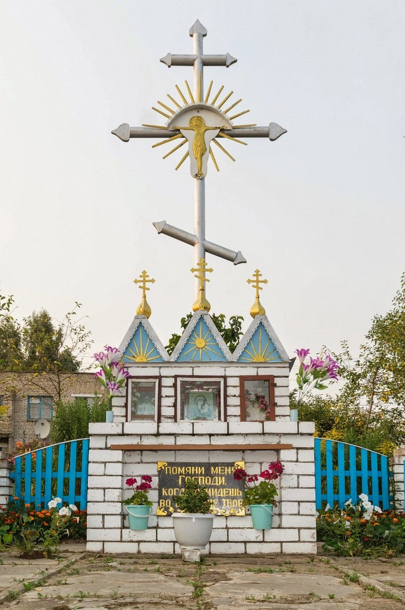 Карабы 2. Праваслаўная каплічка